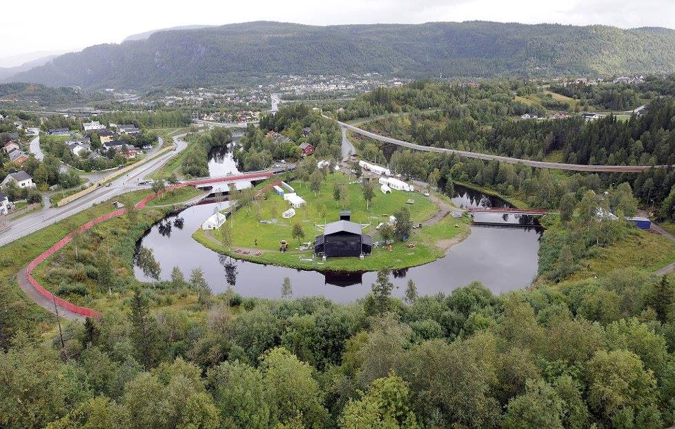 Oversiktsbilde over festivalomeråde på verket musikkfestival